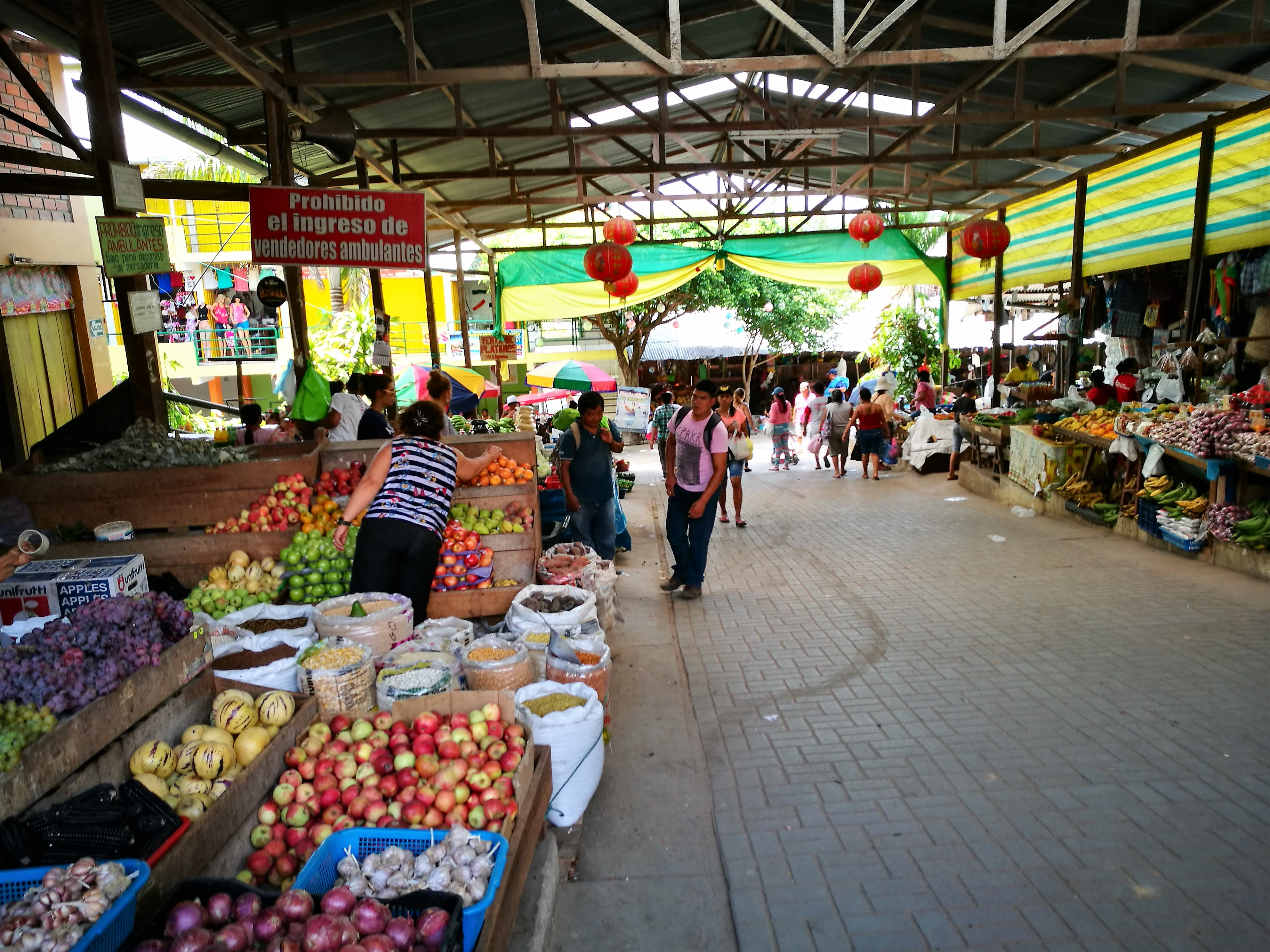 Parades de fruita del Mercado el Huequito, Tarapoto